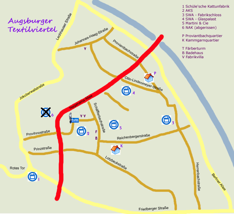 Übersichtgrafik zum Augsburger Textilviertel